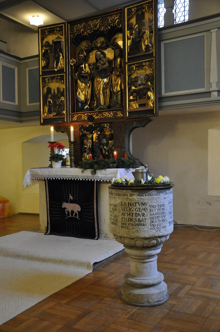 Taufstein und Altar der Kirche Fördergersdorf